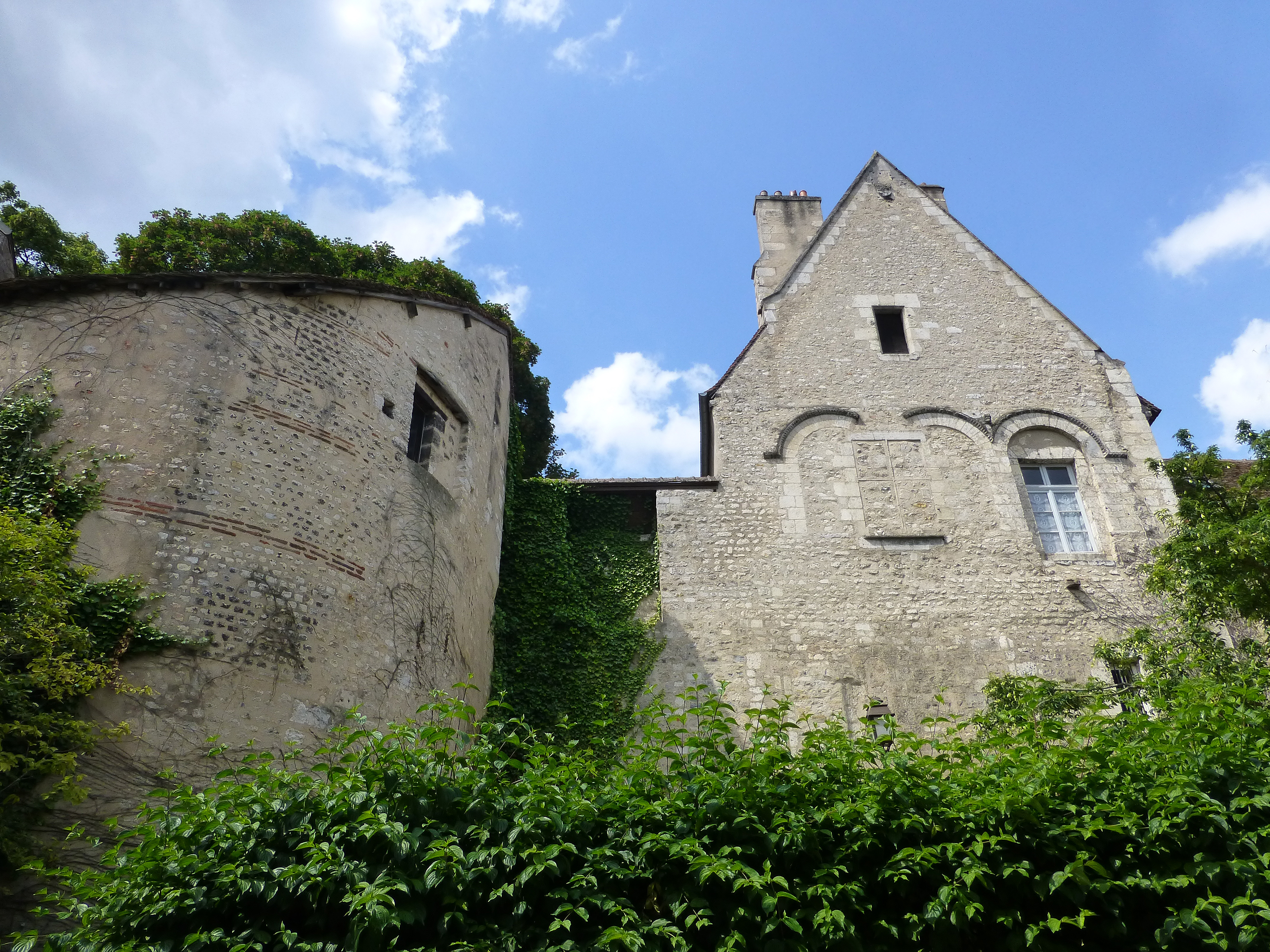 Bourges (Cher) : remparts gallo-romains